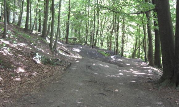 Pingenfeld der Zeche Carthäuser Loch